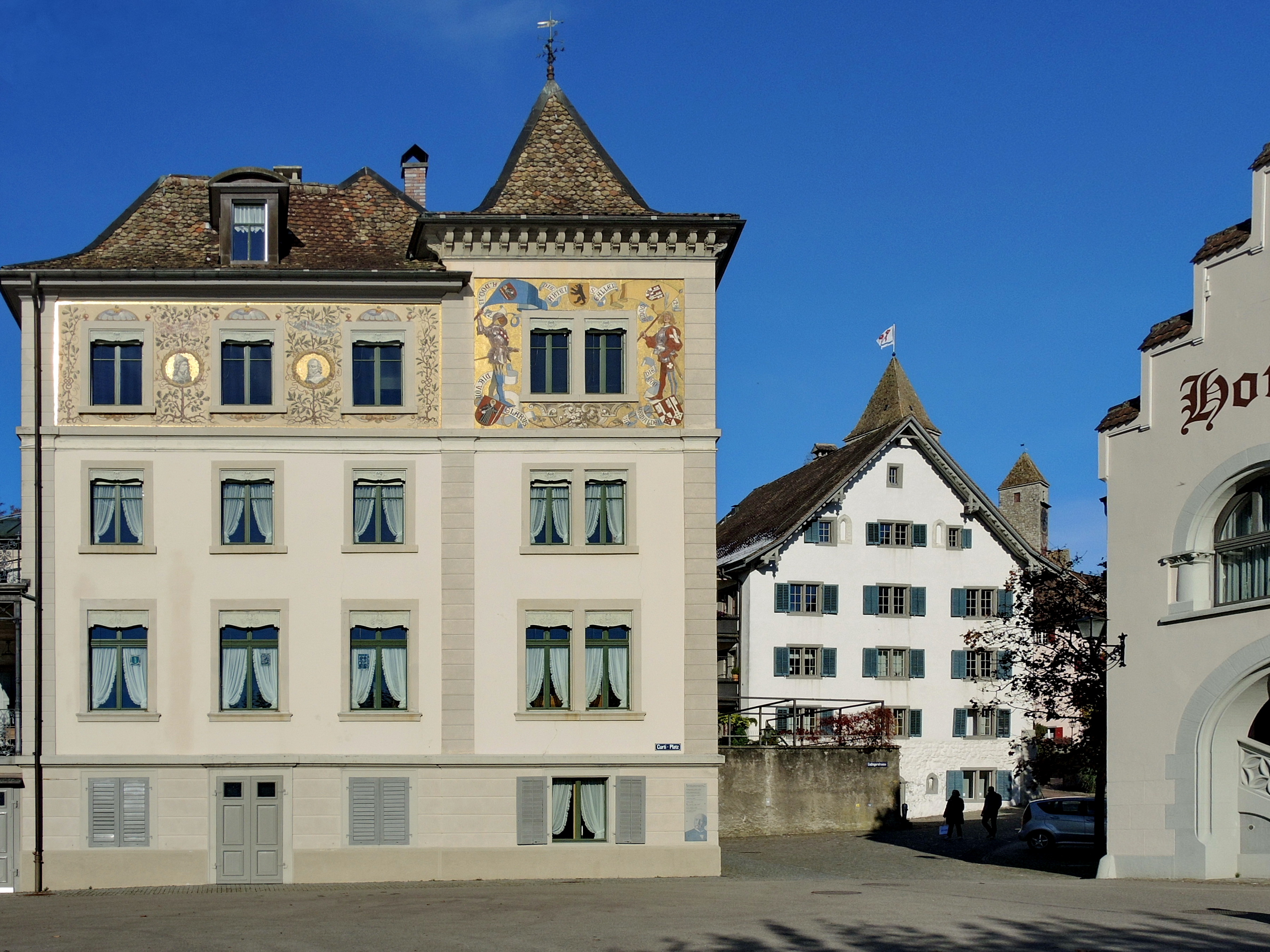 Endingerplatz in Rapperswil (Switzerland) : Curti-Haus, Haus Schlossberg, Hotel Schwanen.